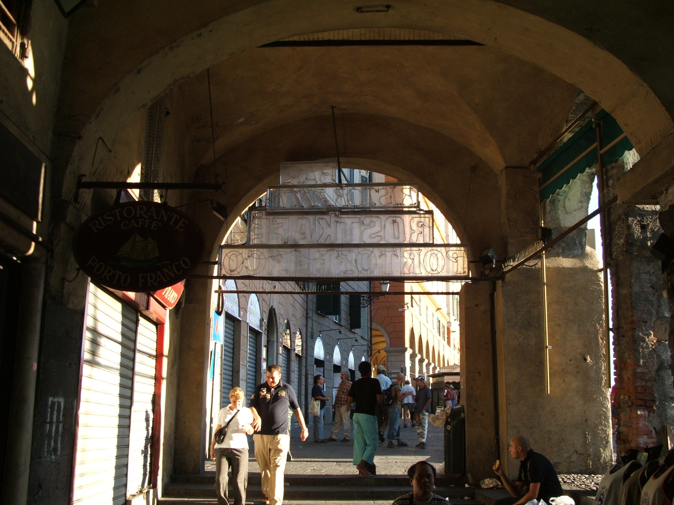 Immagine dalla città di Genova